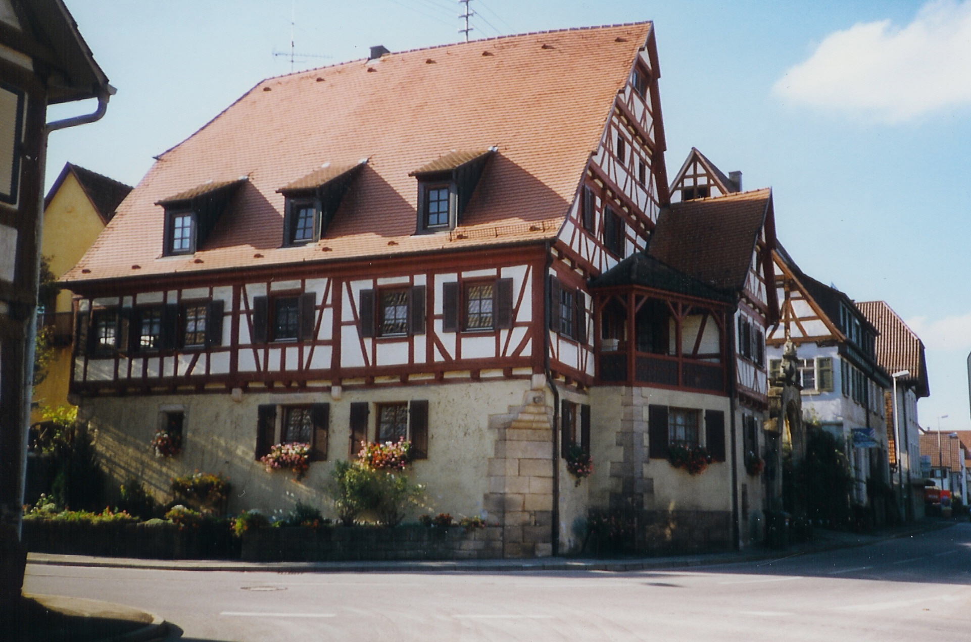 Walddorfhäslach, Fachwerkbau Schlosshof 1